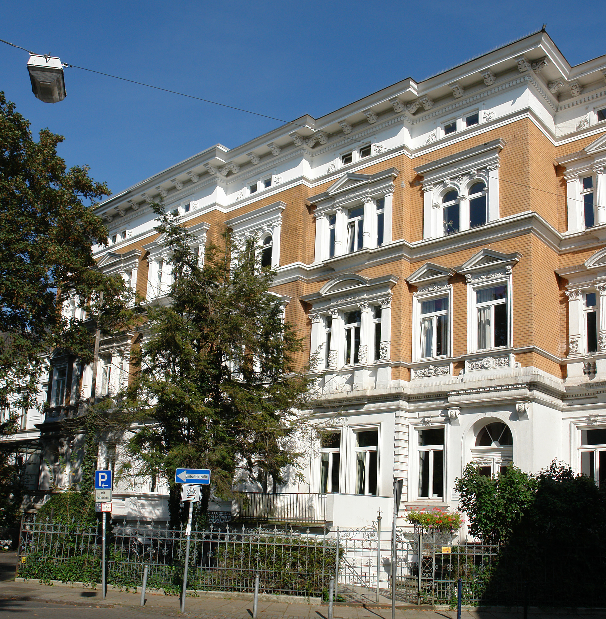 Wohnhaus in Bremen, Contrescarpe 8C-B-A. Das abgebildete Objekt ist ein geschütztes Kulturdenkmal in der Freien Hansestadt Bremen, mit der Nr. 0261 beim Landesamt für Denkmalpflege registriert. Das abgebildete Objekt ist ein geschütztes Kulturdenkmal in der Freien Hansestadt Bremen, mit der Nr. 0262 beim Landesamt für Denkmalpflege registriert. Das abgebildete Objekt ist ein geschütztes Kulturdenkmal in der Freien Hansestadt Bremen, mit der Nr. 0263 beim Landesamt für Denkmalpflege registriert.